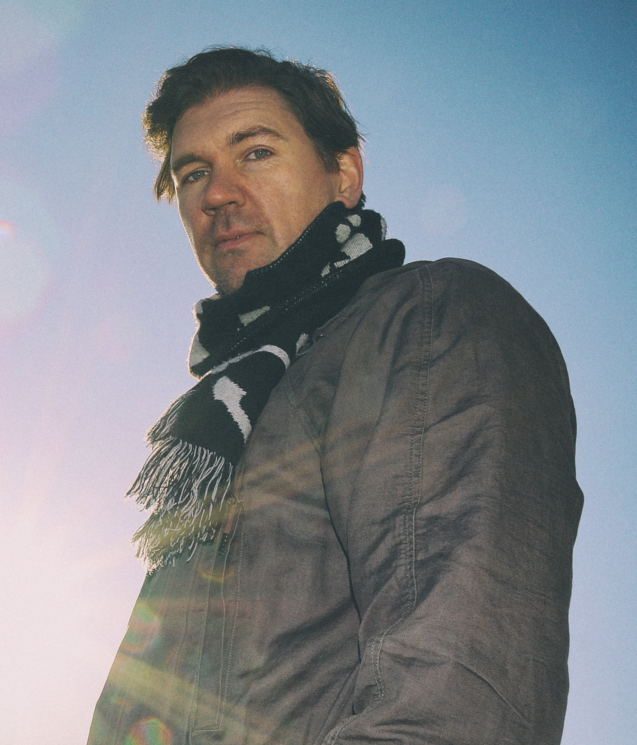 Antti Granlund, toimittaja, juontaja